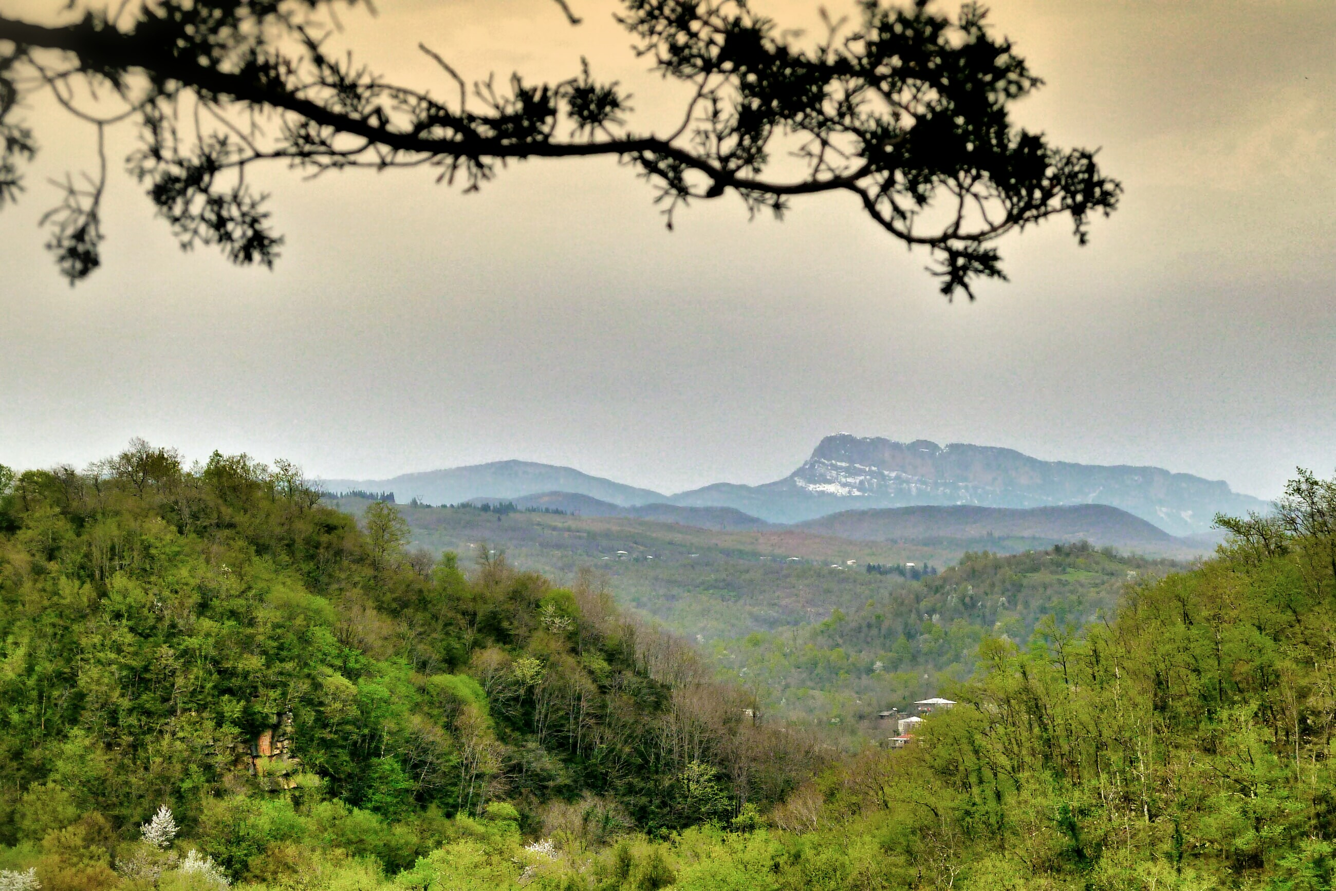 Khomli Mountain - Lechkhumi - Georgia